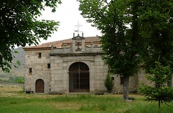 Ermita del Cristo del Caloco en El Espinar (Segovia) Autor: Jmorcillo. Fotografía de libre disposición